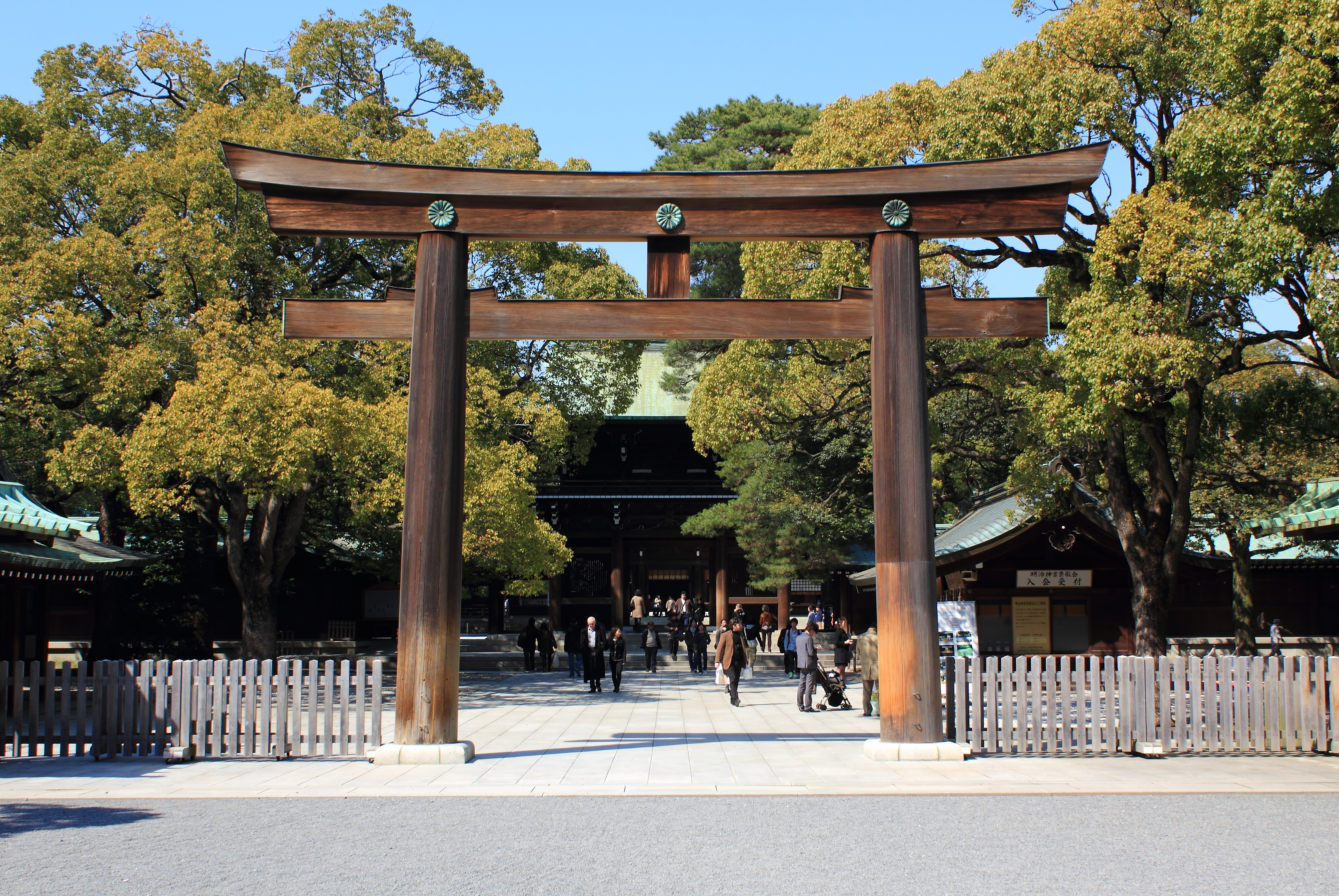 明治神宮の鳥居